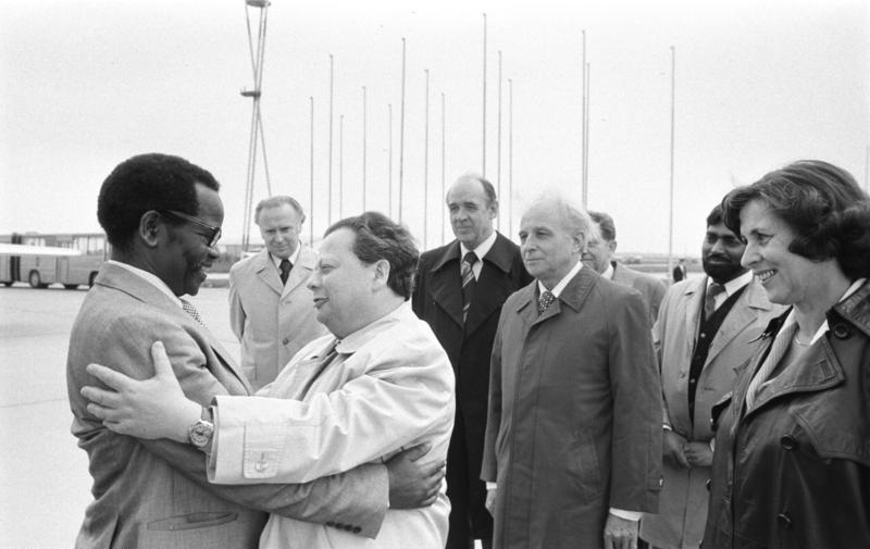 ADN-ZB Franke 15.5.1978 Berlin: Eine Delegation des Afrikanischen Nationalkongresses (ANC) Südafrika unter Leitung seines Präsidenten, Oliver Tambo (l.), traf am 15.5. in Berlin ein. Sie wurde von Hermann Axen, Mitglied des Politbüros und Sekretär des ZK der SED (M.); Kurt Seibt, Vorsitzender der Zentralen Revisionskommission der SED und Präsident des Solidaritätskomitees der DDR (r.); sowie leitenden Mitarbeitern des ZK der SED willkommen geheißen.